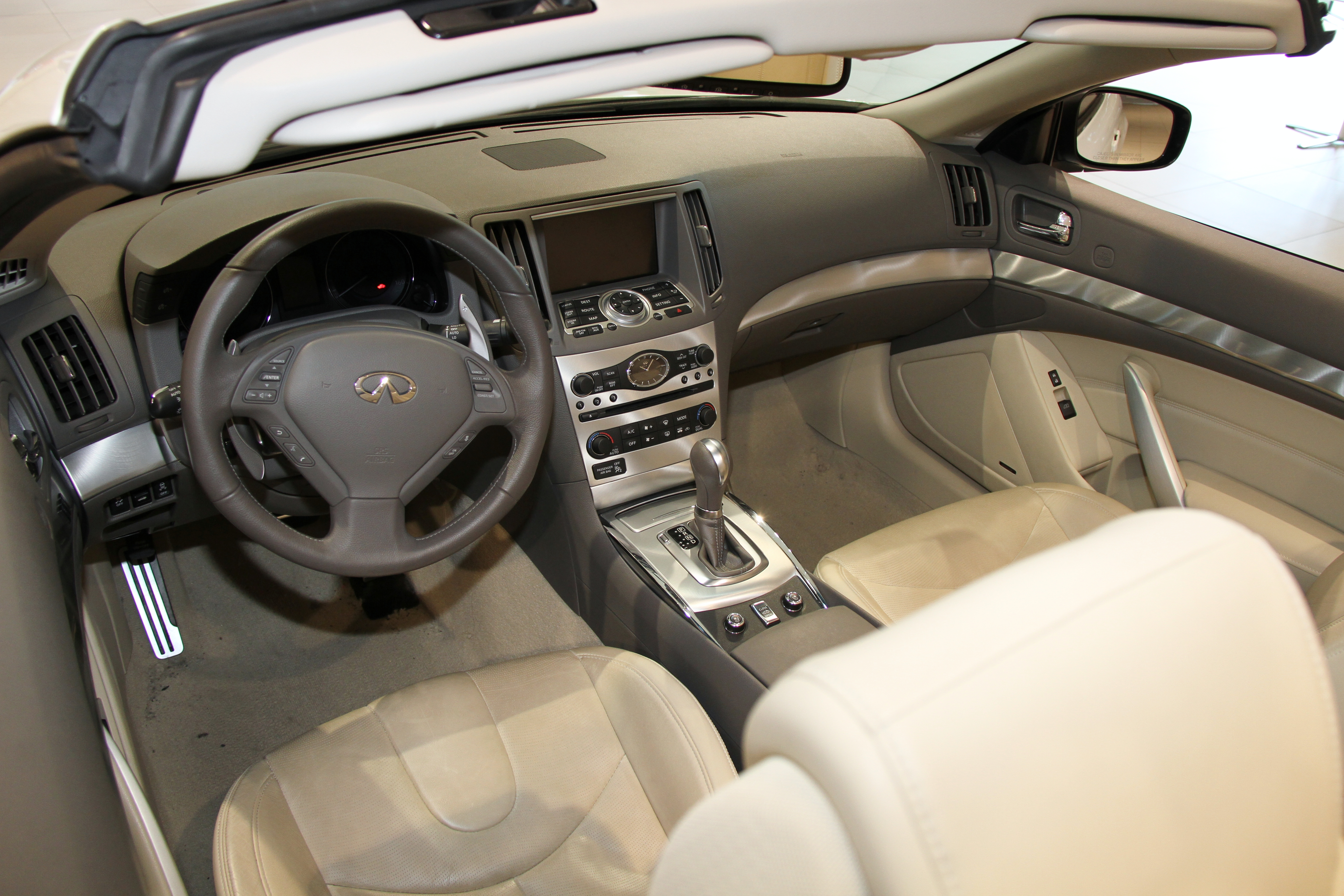 Infiniti G37S Convertible